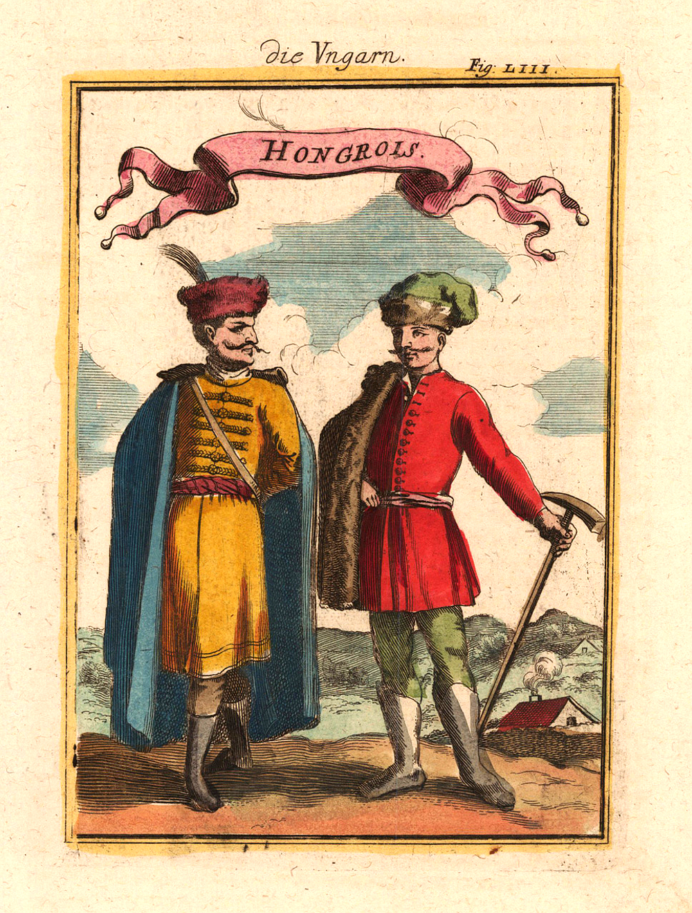 Magyar viselet 1686